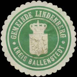 Sealing stamp Title: Gemeinde Lindenberg Kreis Ballenstedt Description: grün, weiß, geprägt Place: Lindenberg size: 4 cm